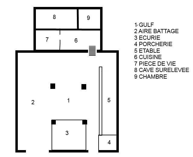 Plan de la maison à Gulf, Frise orientale